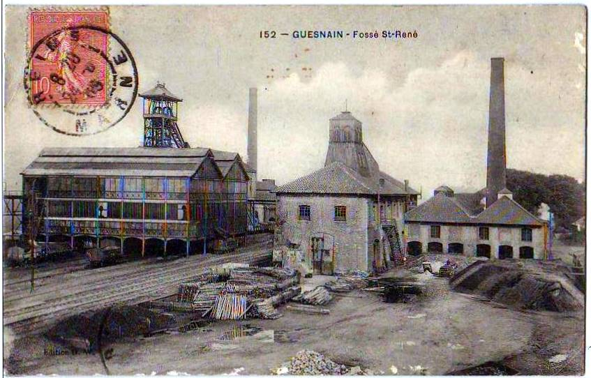 Fosse Saint René à Guesnain aujourd'hui disparue